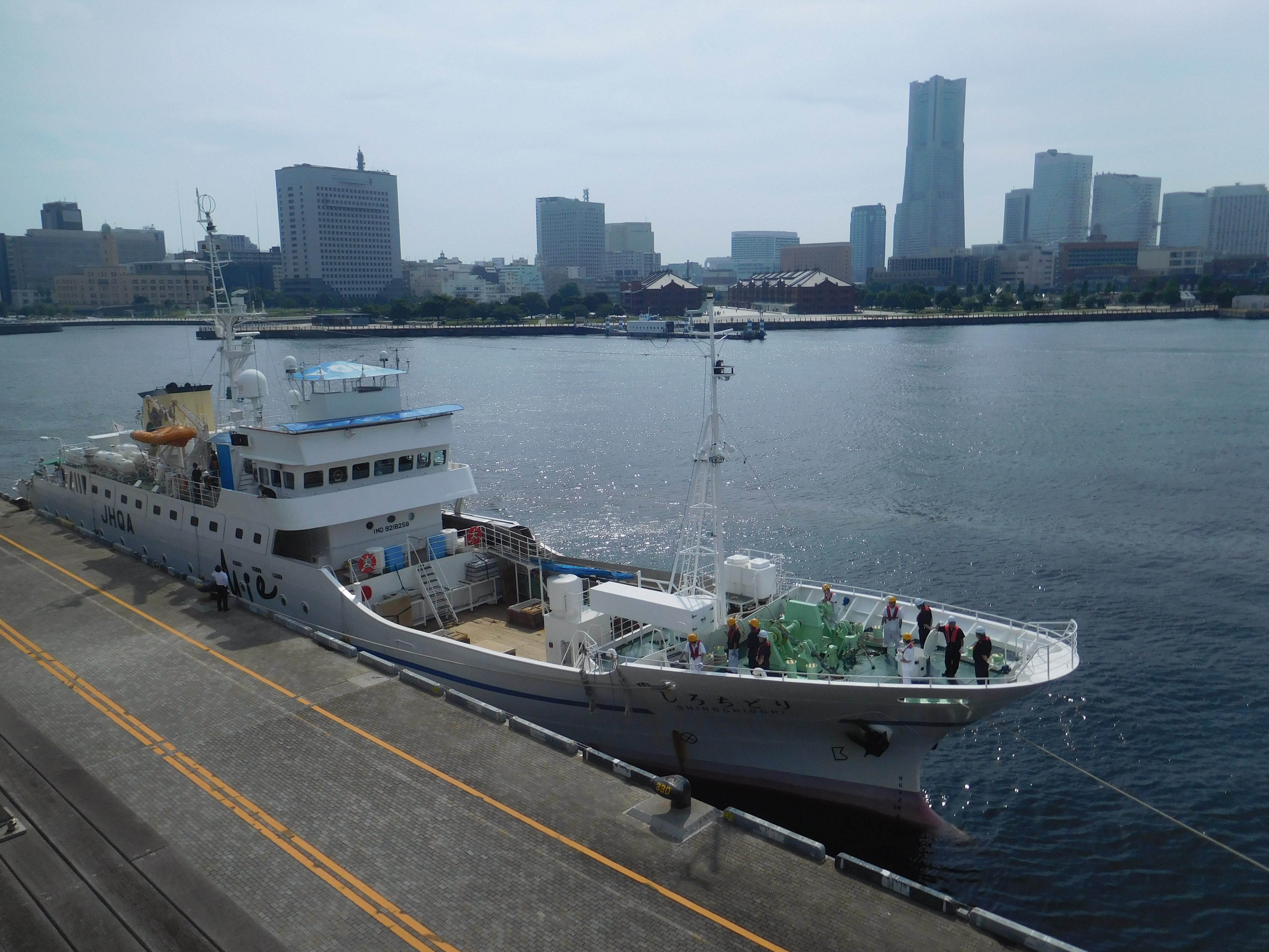 三重県立水産高等学校の実習船しろちどり、大さん橋にて前から